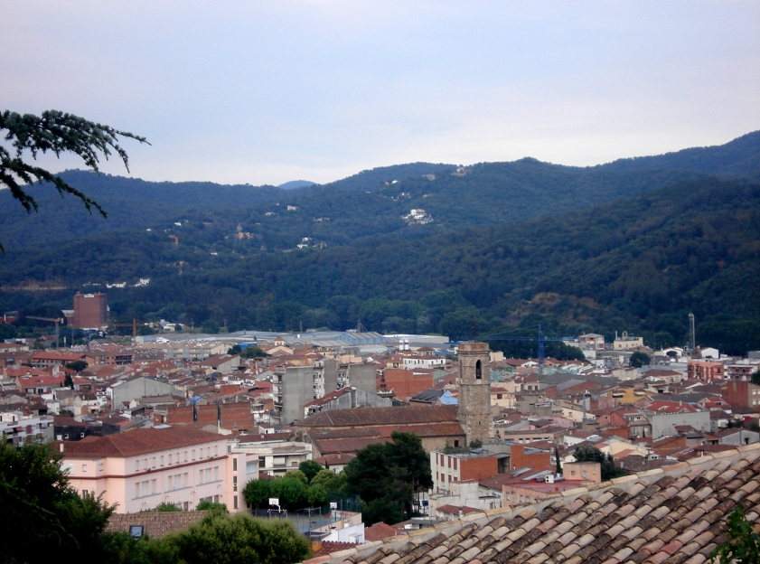 vista sant celoni nort